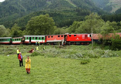 Zwei Zugs-Garnituren der Pinzgaubahn stießen bei Bramberg frontal zusammen. Die Unfallstelle lag unmittelbar nach einem Gleisbogen in einem Bereich mit begrenzten Sichtverhältnissen. Ein Triebfahrzeugführer und eine Reisende kamen ums Leben, 31 Menschen wurden zum Teil schwer verletzt. Der von Krimml nach Zell am See fahrende Zug hatte die Kreuzung nicht abgewartet. Eine Zugbeeinflussung ist auf der Pinzgaubahn nicht vorhanden, es kommt der Zugleitbetrieb zum Einsatz